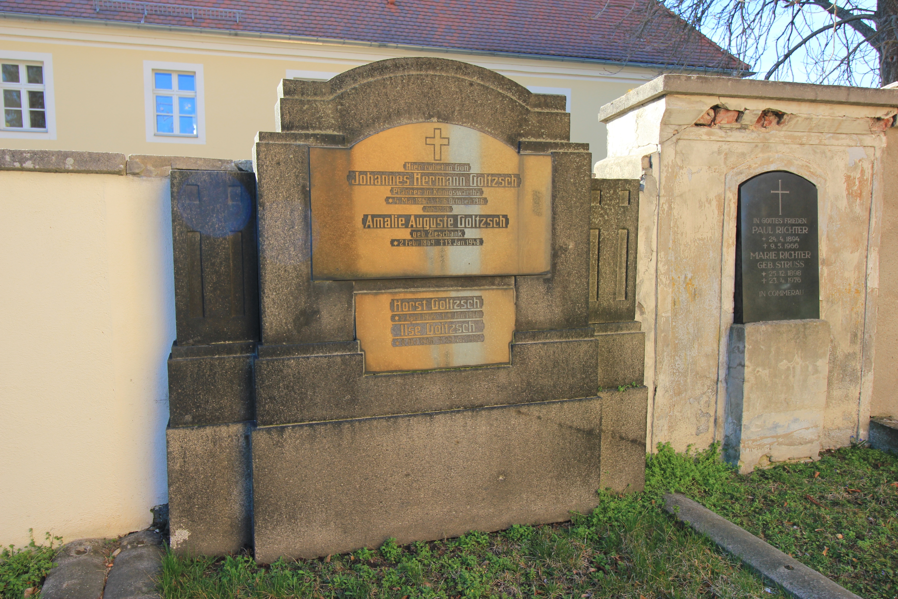 Hornjoserbsce: Row fararja Jana Gólča na starym kěrchowje w Rakecach